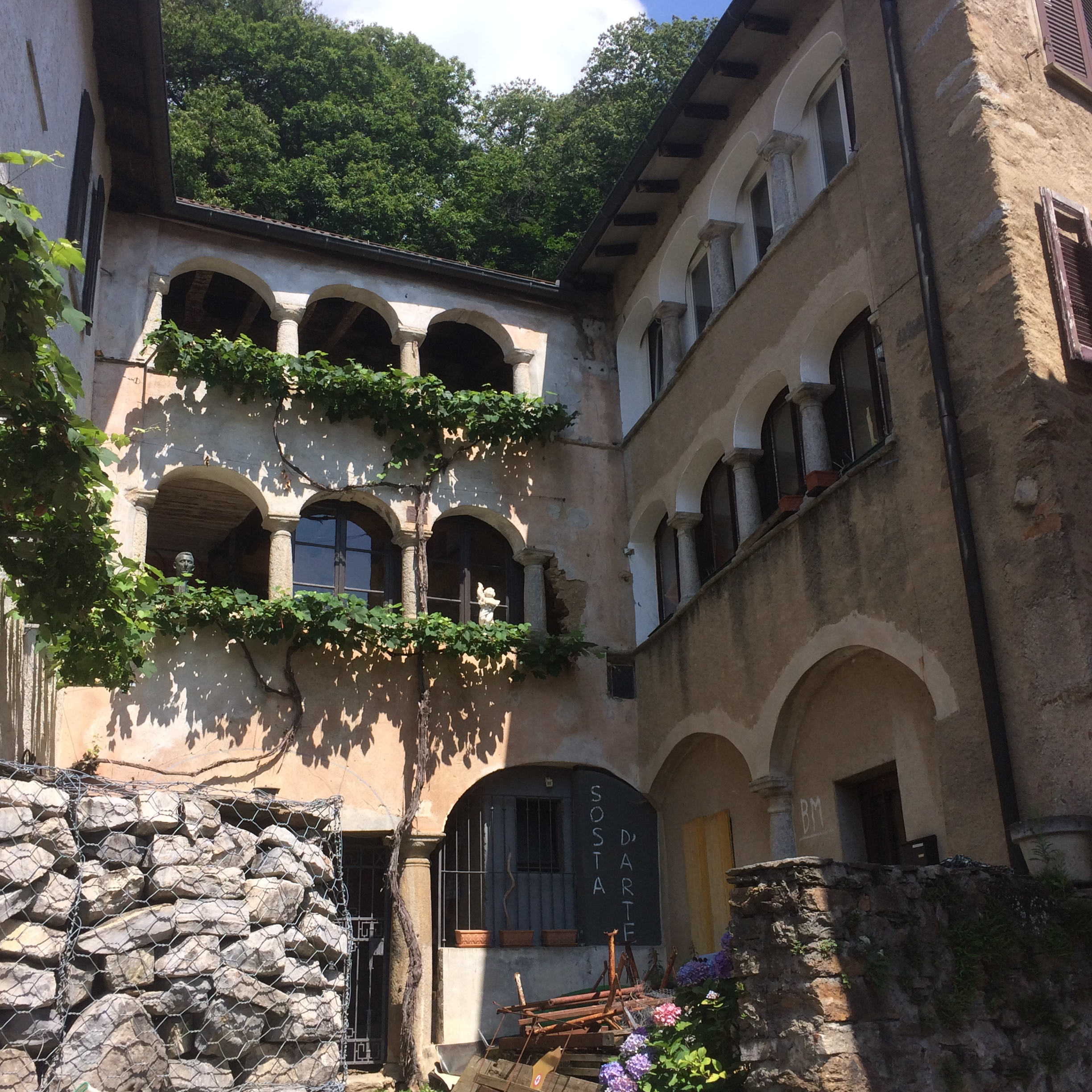 Haus in Fescoggia, Gemeinde Alto Malcantone (Tessin)